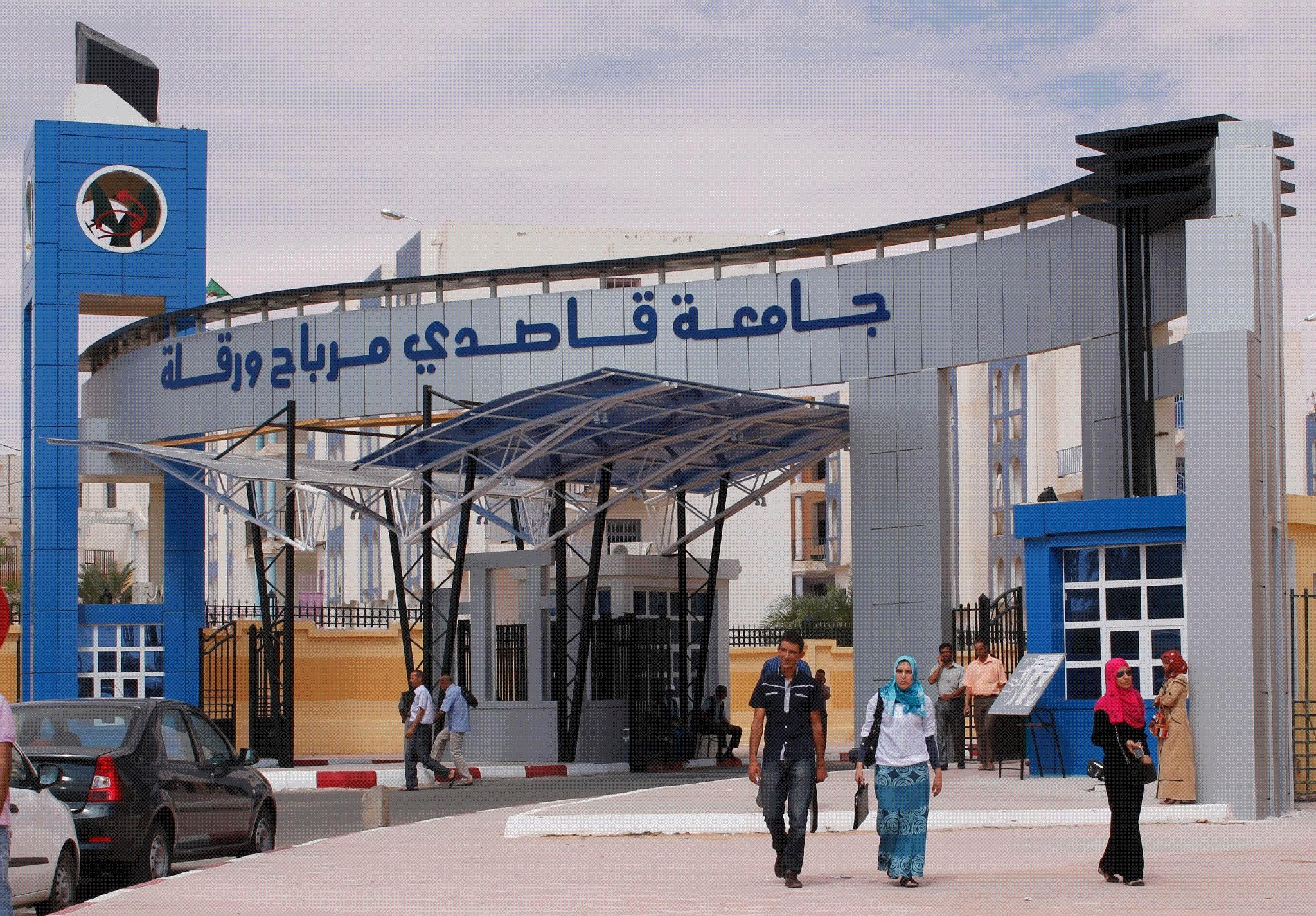 Entrée de du CAMPUS 02 Cité en'nacer